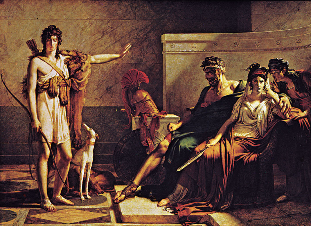 “Phèdre et Hippolyte,” par Pierre-Narcisse Guérin, Louvre Photo des Musées Nationaux, Paris